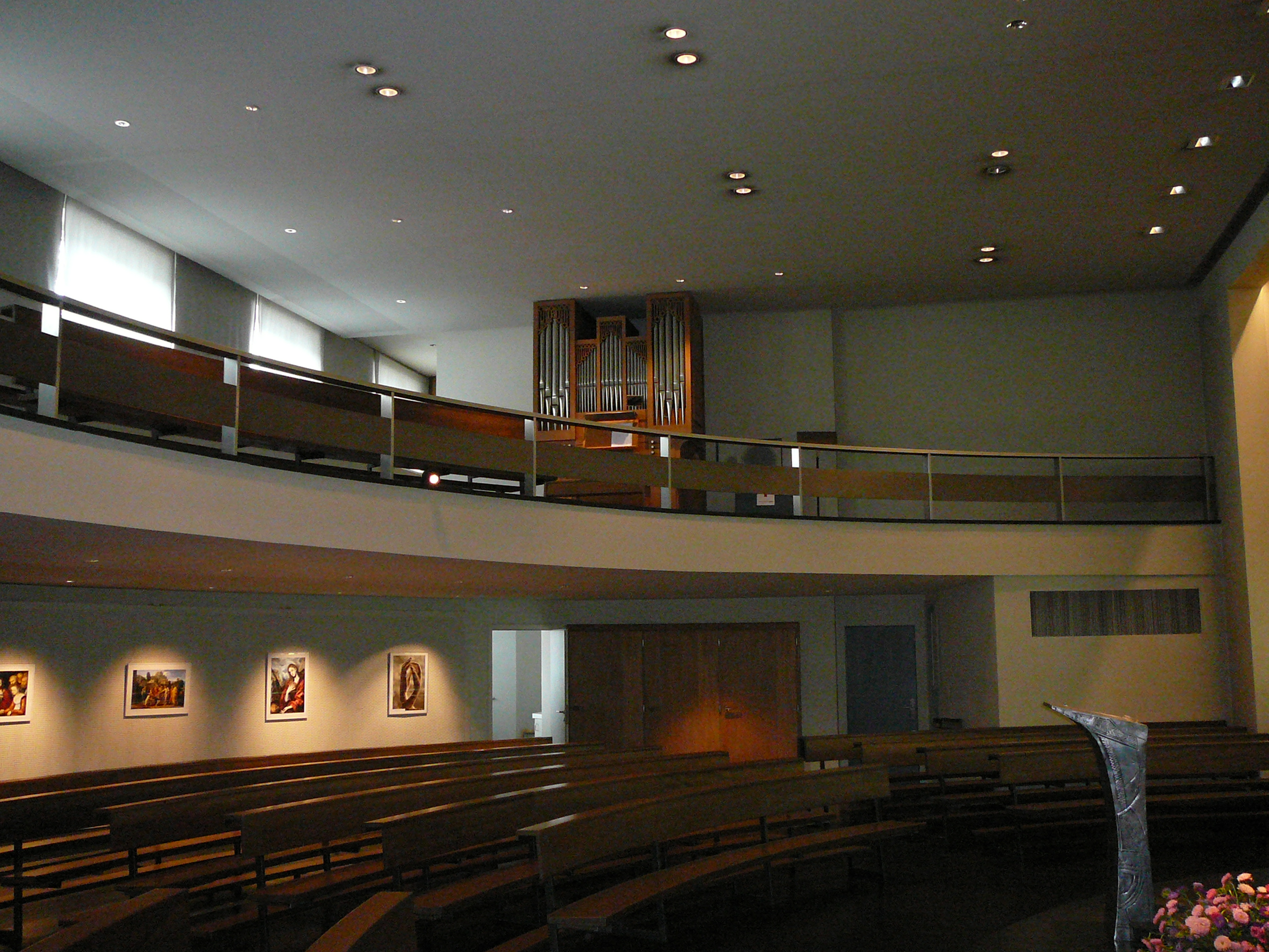 Römisch-katholische Kirche Sainte Famillie in Zürich, innen